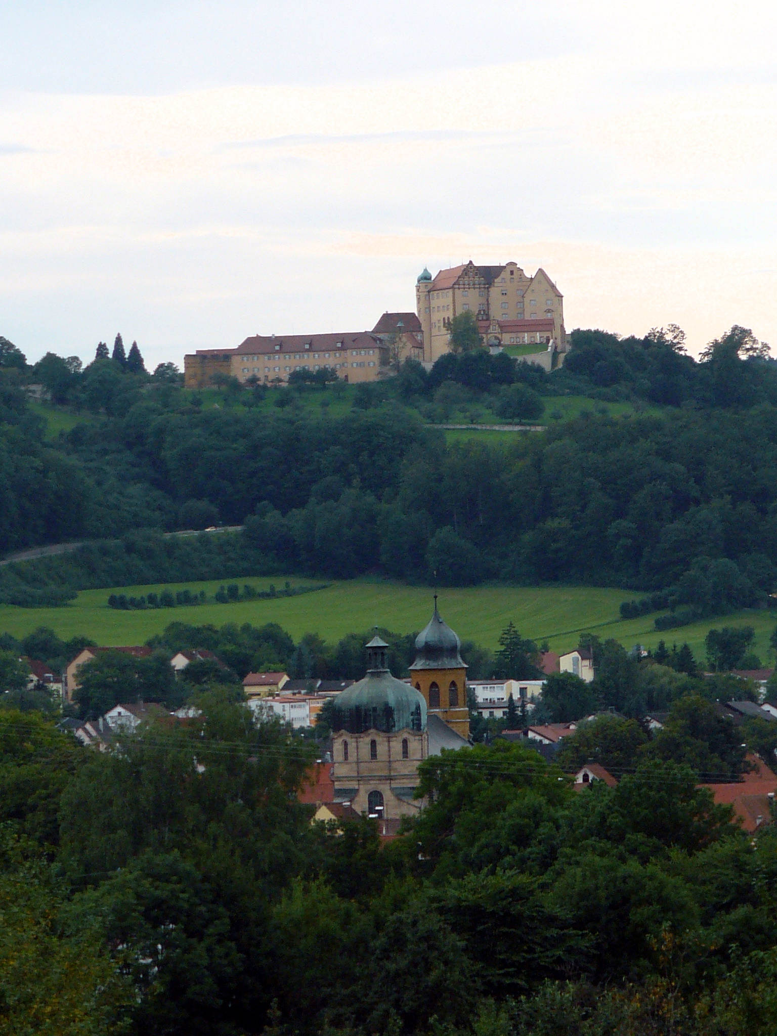 Schloss Kapfenburg über Lauchheim